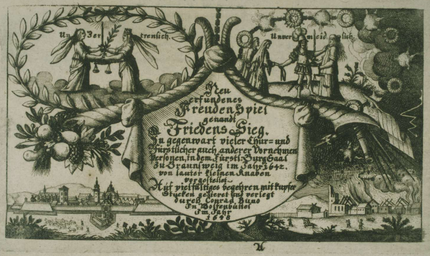 Titelblatt des Singspiels Neu erfundenes Freuden Spiel genandt Friedens Sieg (1642) von „Justus Georg Schottel“ – eigentlich Sophie Elisabeth, Herzogin von Mecklenburg.